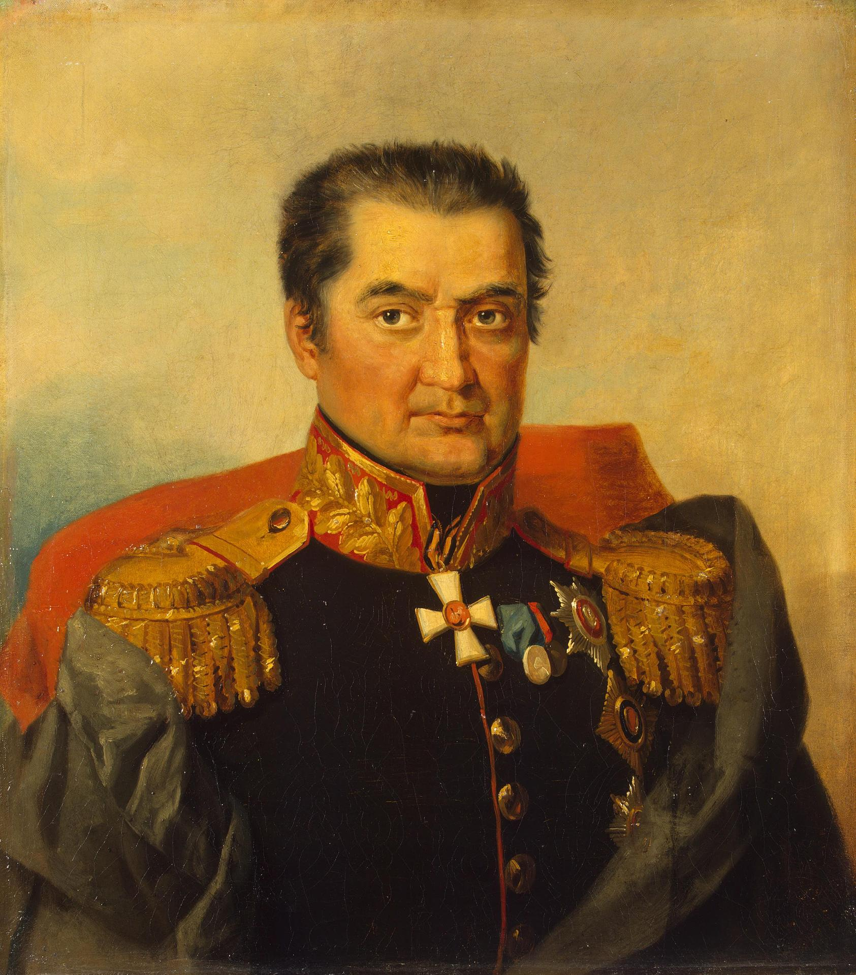 Evgeny Ivanovich Markov 1-st (1769 – 20.09.1828) russian general